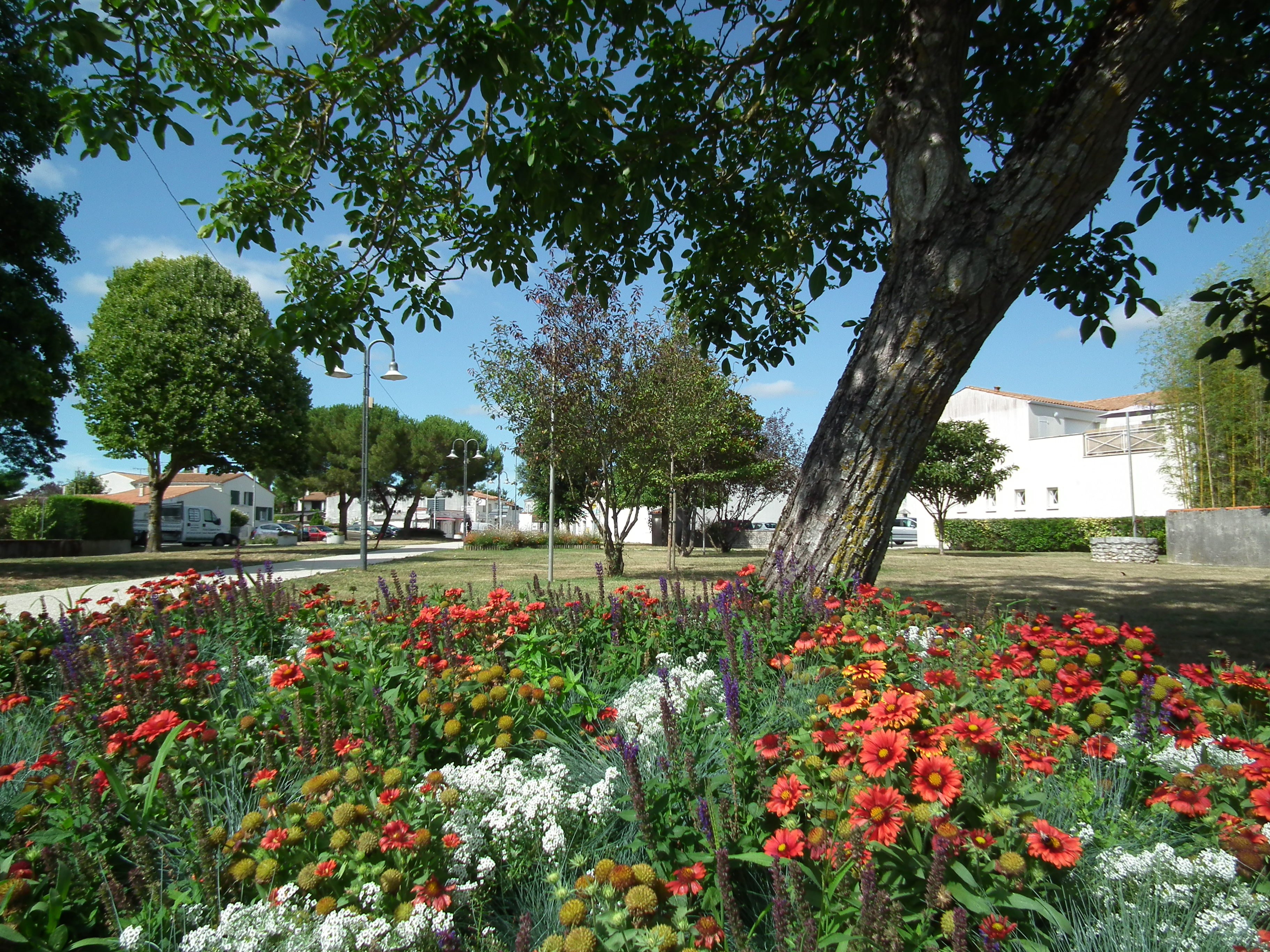 Le jardin Frédéric Passy à Saint-Sulpice-de-Royan